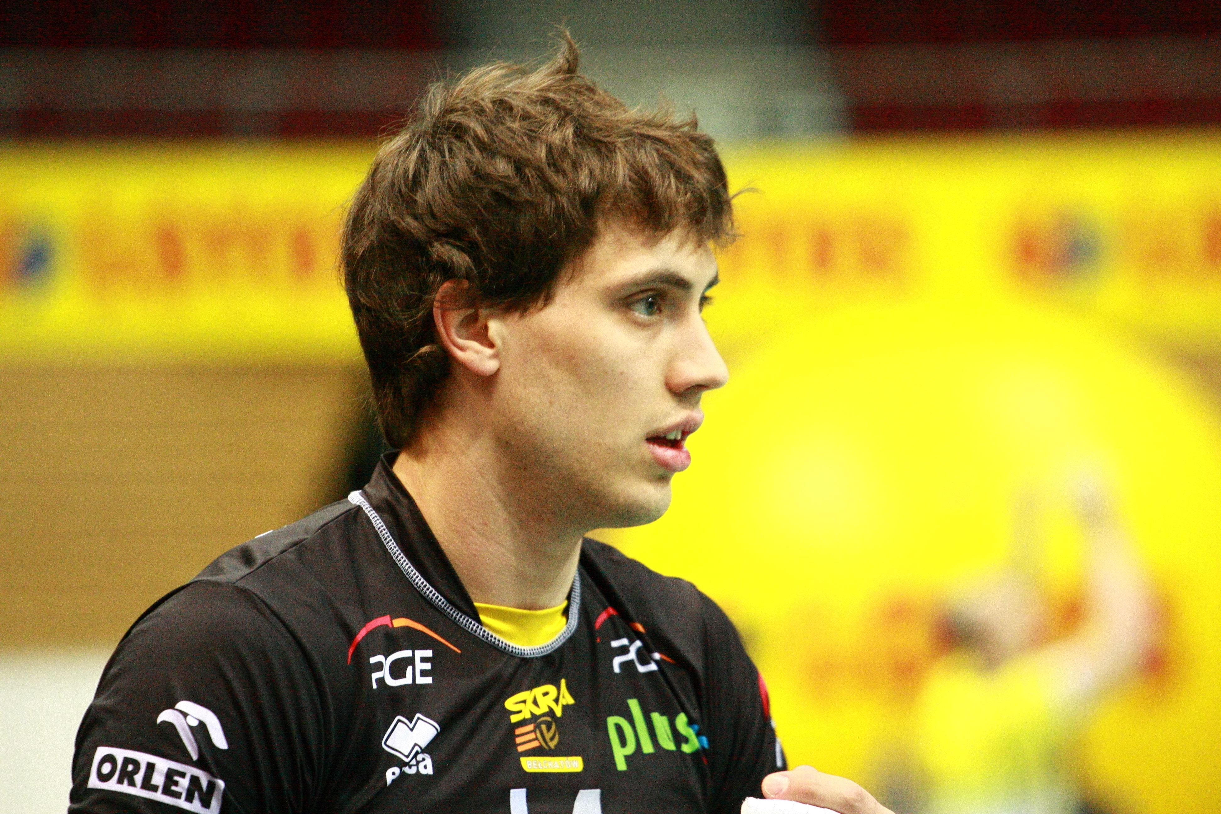 Lotos Trefl Gdańsk vs Skra Bełchatów